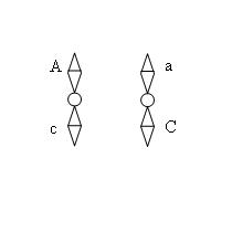 Heterosügoot